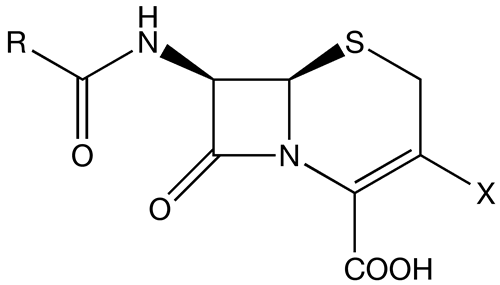 Cephalosporin nucleus